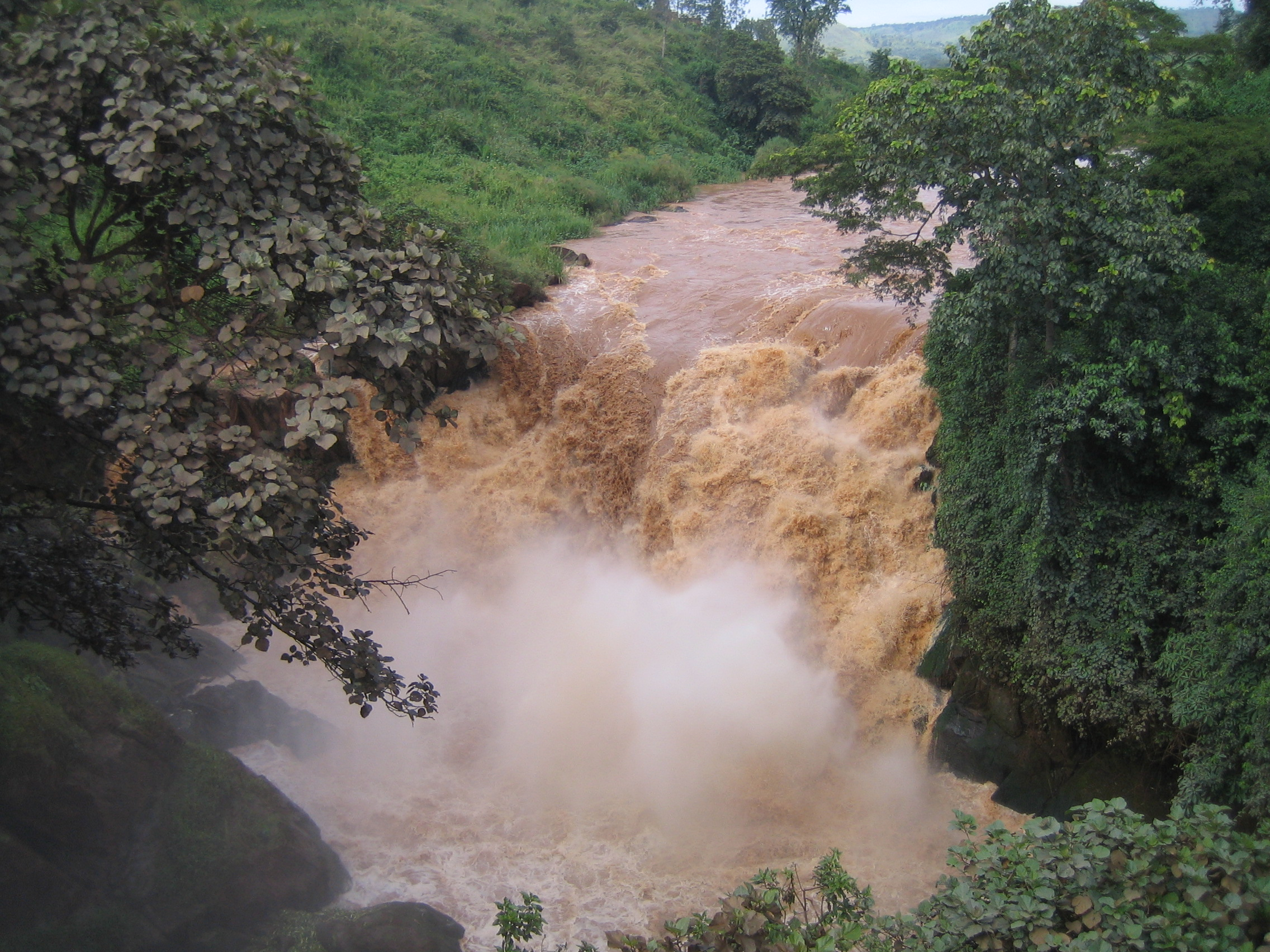 Taken by SteveRwanda